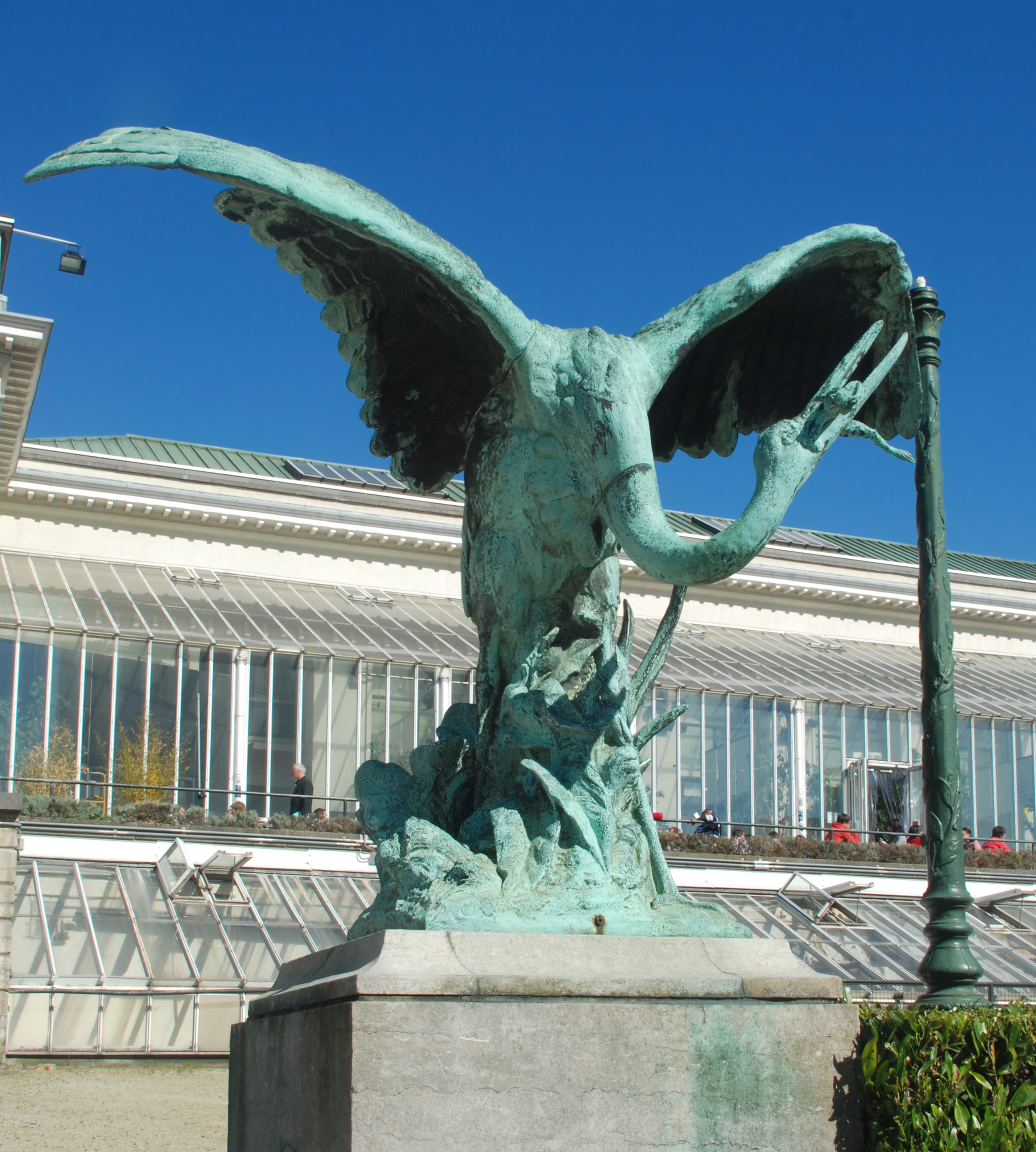 Belgique - Bruxelles - Jardin botanique de Bruxelles - La Cigogne d'Edmond Lefever This photo of immovable heritage has been taken in the Brussels Capital Region